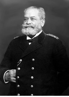 Marine-Generalarzt Dr. Richard Kleffel